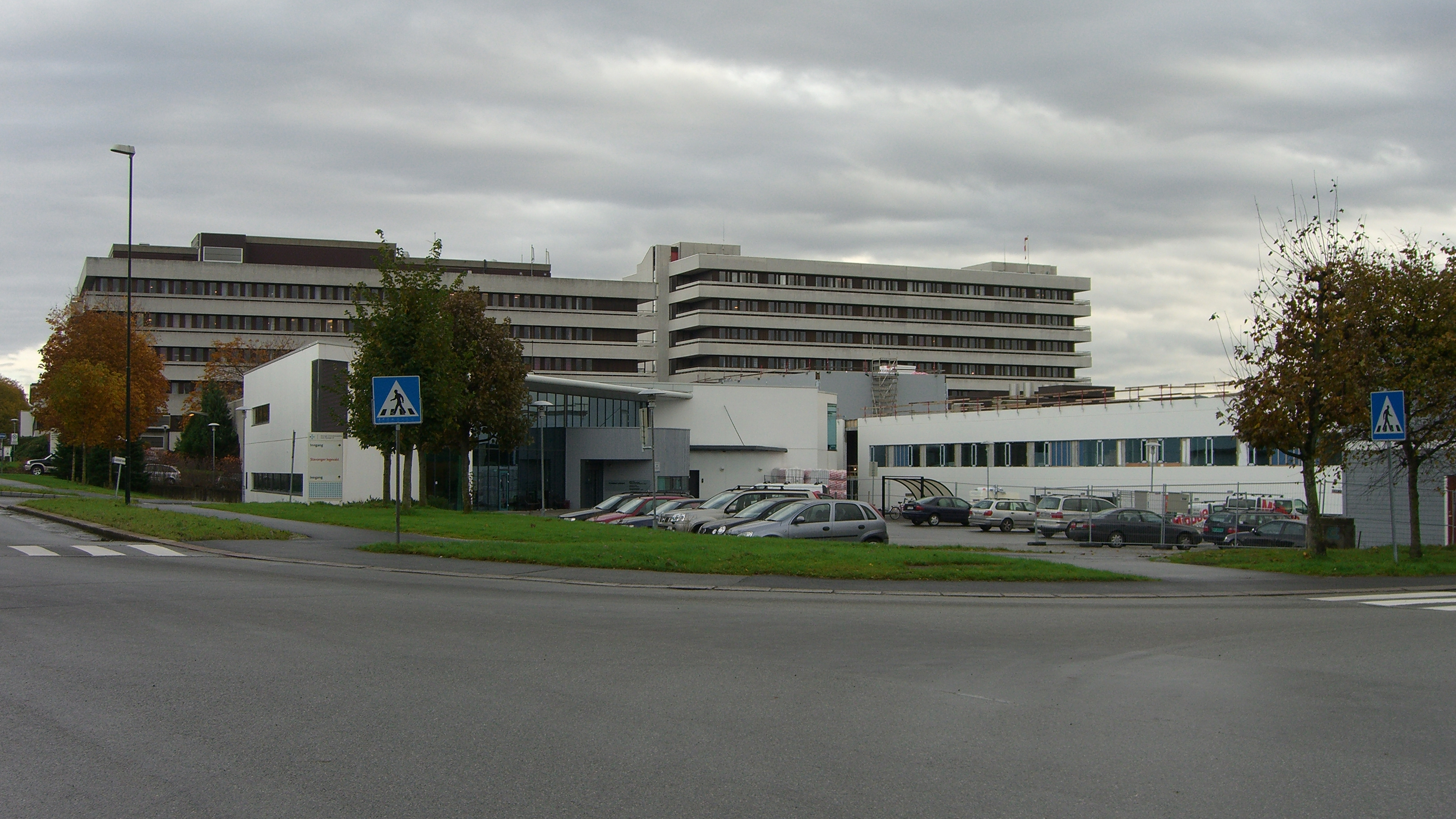 Stavanger University Hospital in Stavanger, Norway